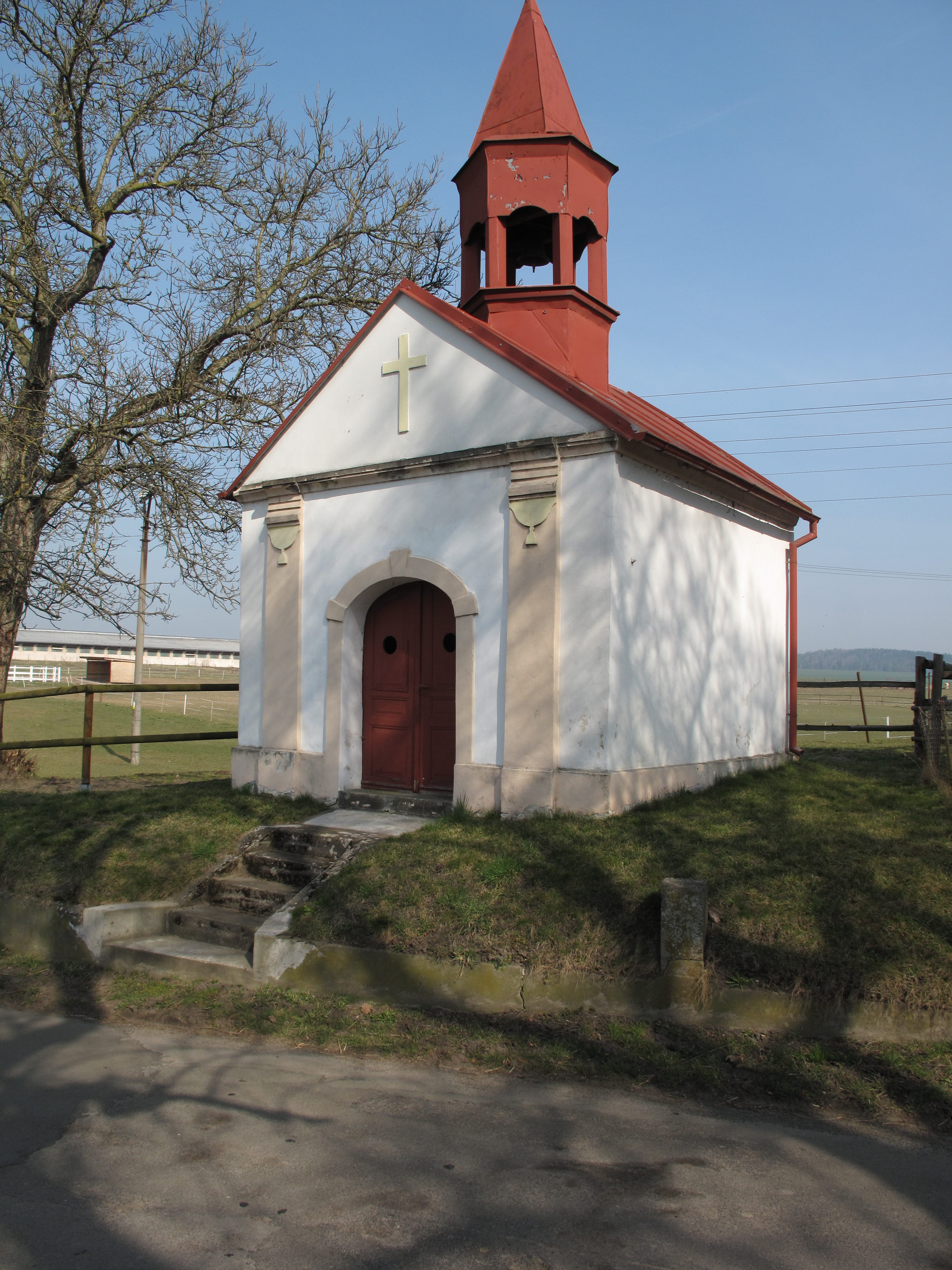 Kaplička v Dolní Rokyté. Okres Mladá Boleslav, Česká republika.